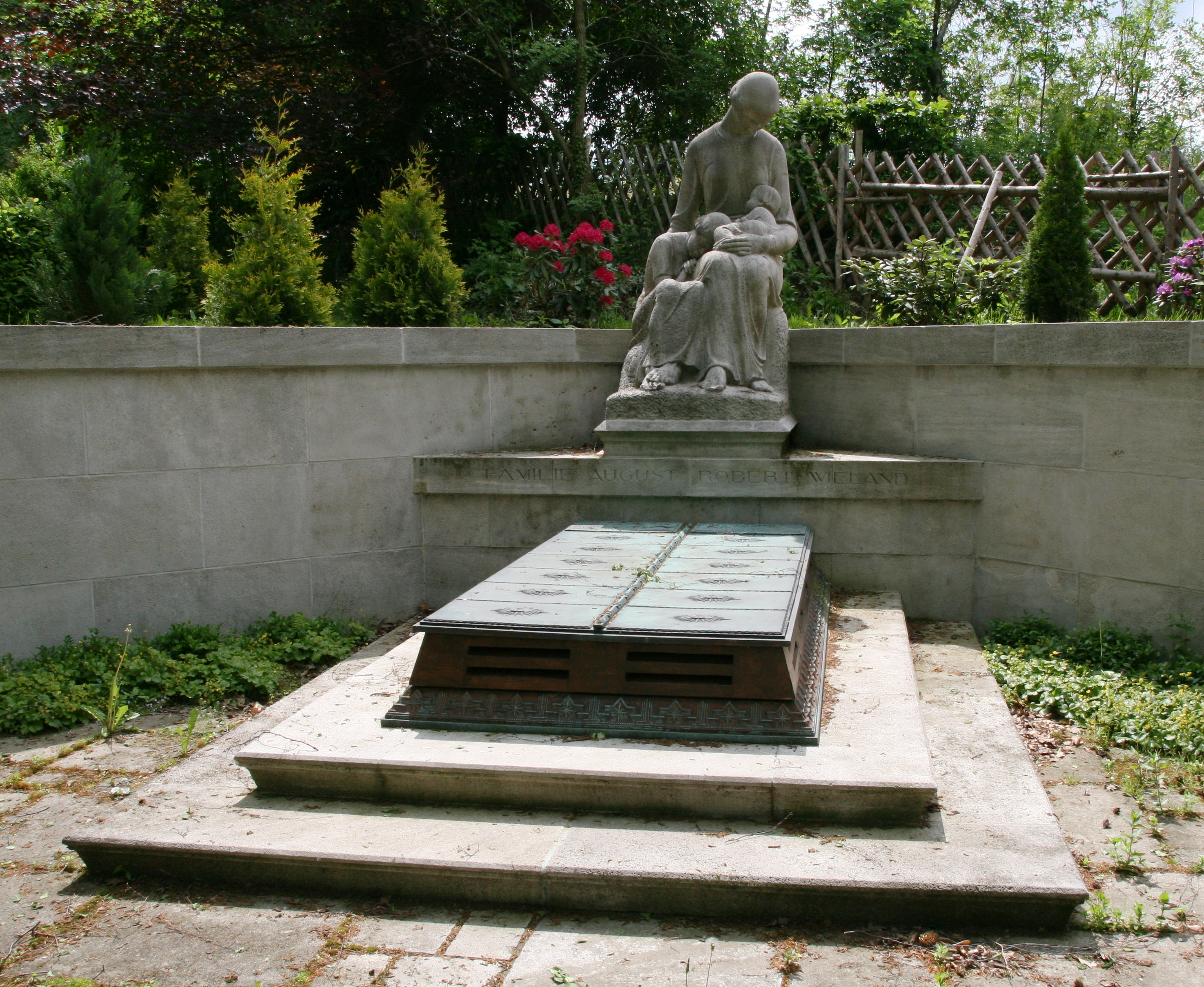 Denkmal 09238137 Auerbach (Erzgebirge); Grabanlagen der Familie August Robert Wieland; ortshistorische Bedeutung